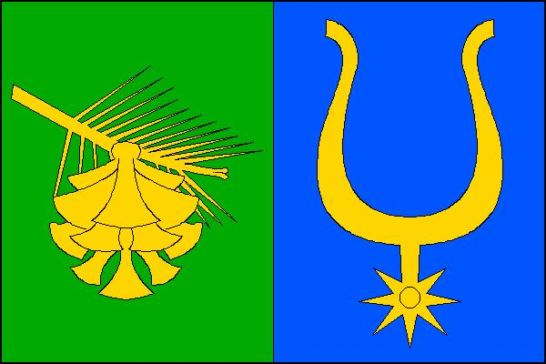 Vlajka obce Borek (okres Havlíčkův Brod)